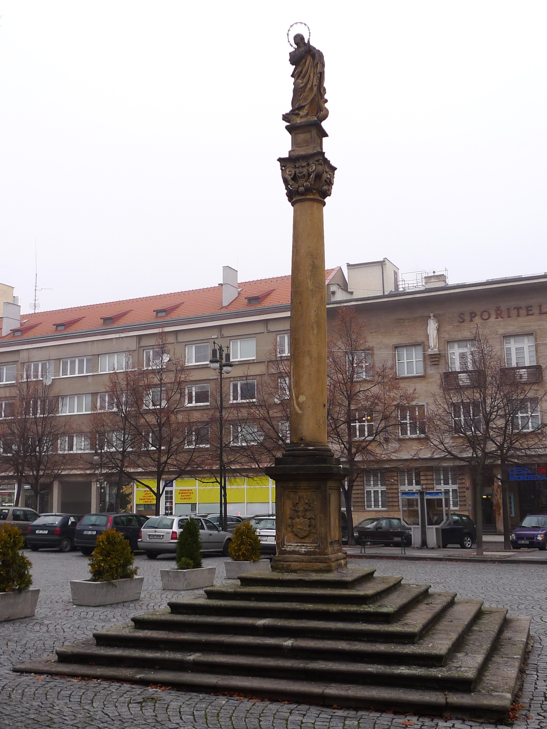 Sloup se sochou Panny Marie, Mírové náměstí, Louny